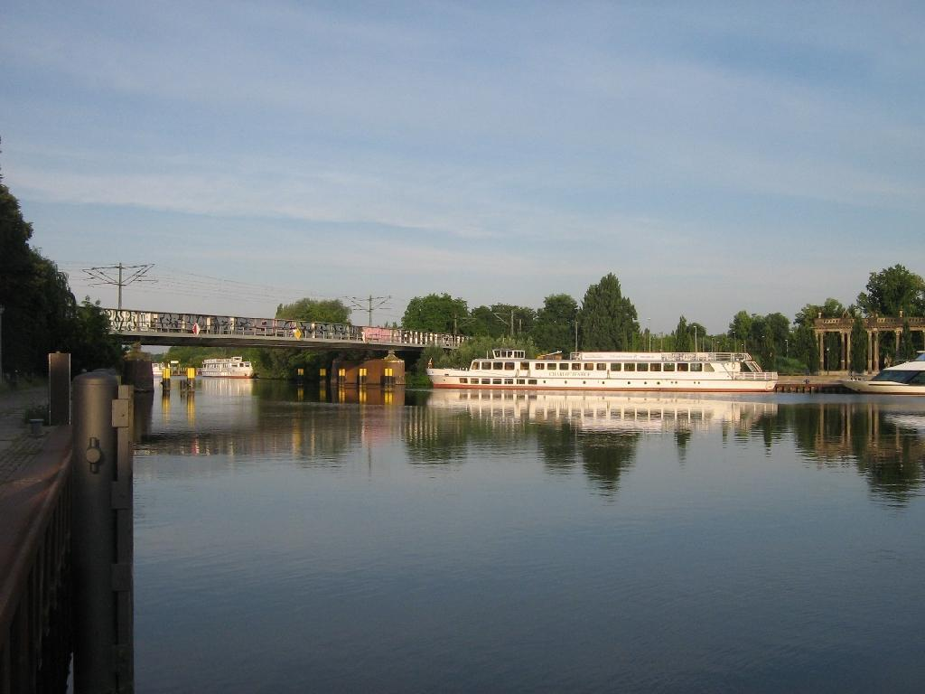 „MV Charlottenhof“ im Hafen der „Weissen Flotte“ auf der Havel in Potsdam